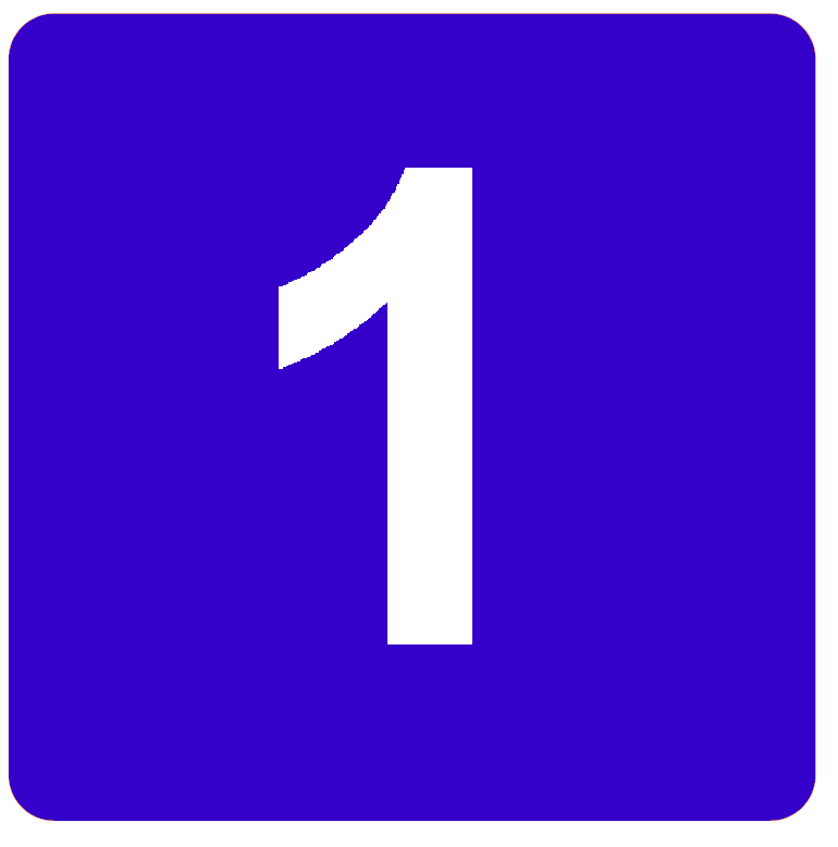 1 Blue